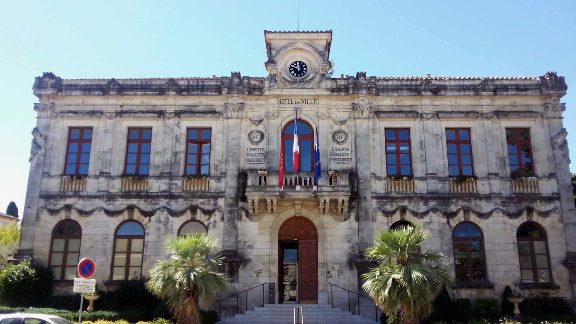 Hôtel de ville de Vauvert (Gard).